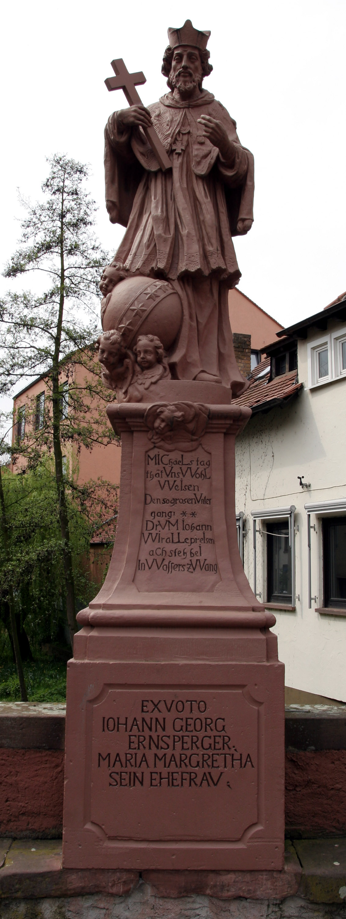 Der Heilige Johannes von Nepomuk als Skulptur auf der Mittelbrücke in Bensheim an der Bergstraße (Südhessen)